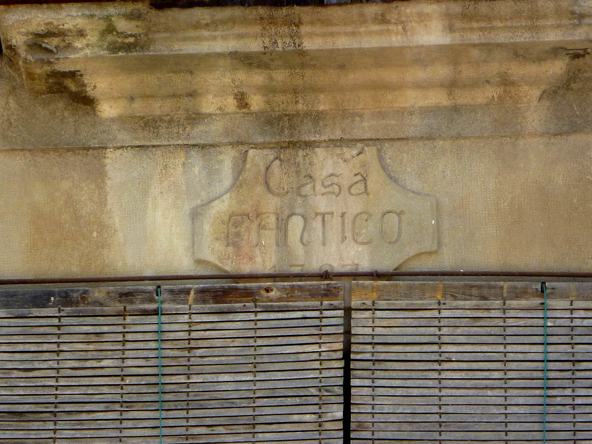 Inscripció a la façana de Cal Fantico a la plaça de l'Hostal de Torà (Segarra)